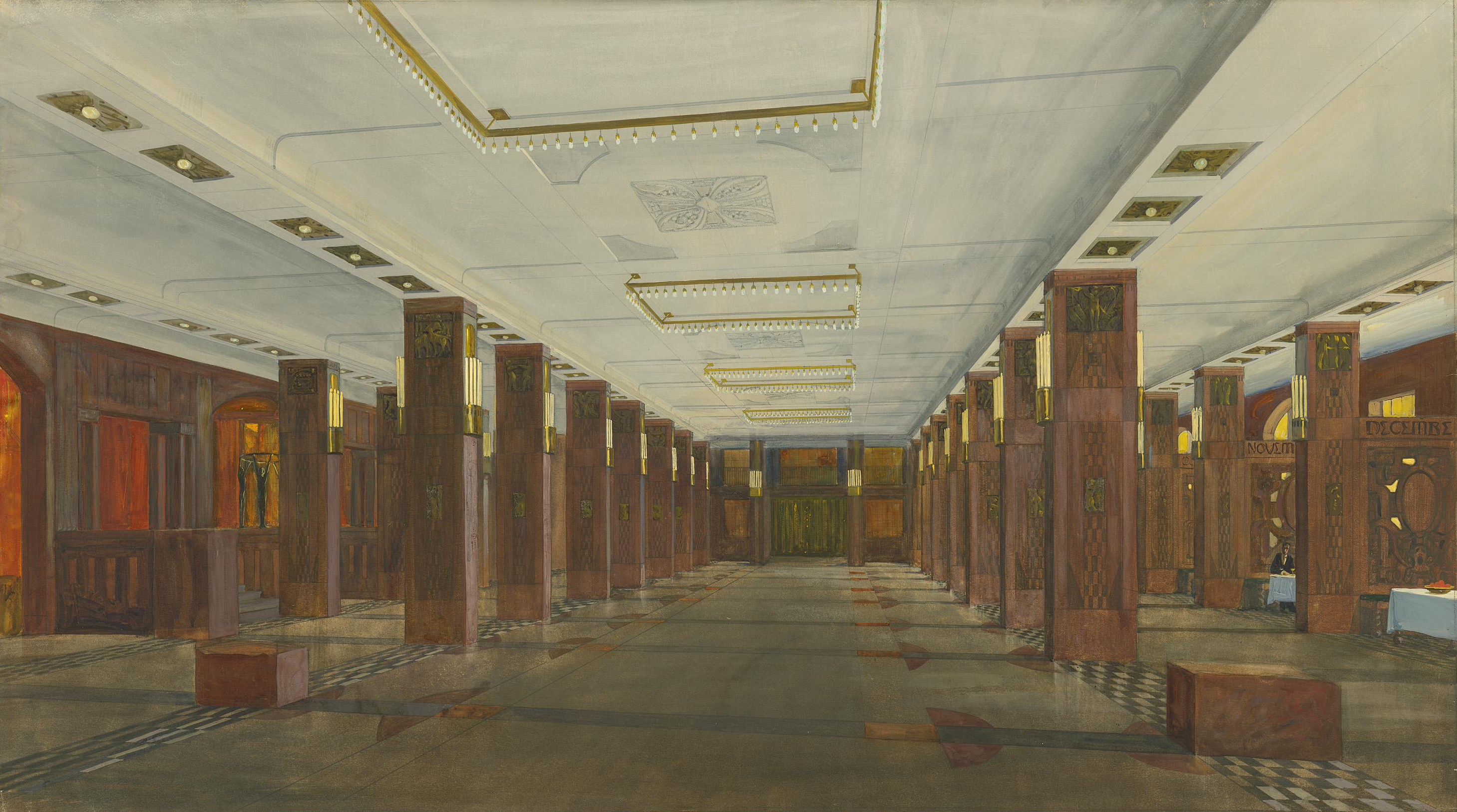 Weinrestaurant Aschinger (Weinhaus Rheingold), perspektivische Innenansicht des Pfeilersaals